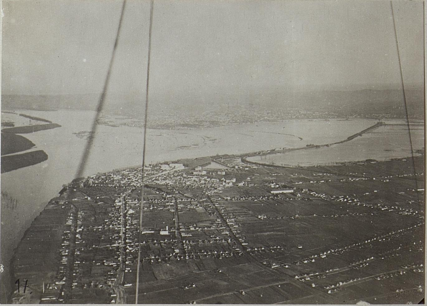 Belgrad im Hintergrunde Semlin